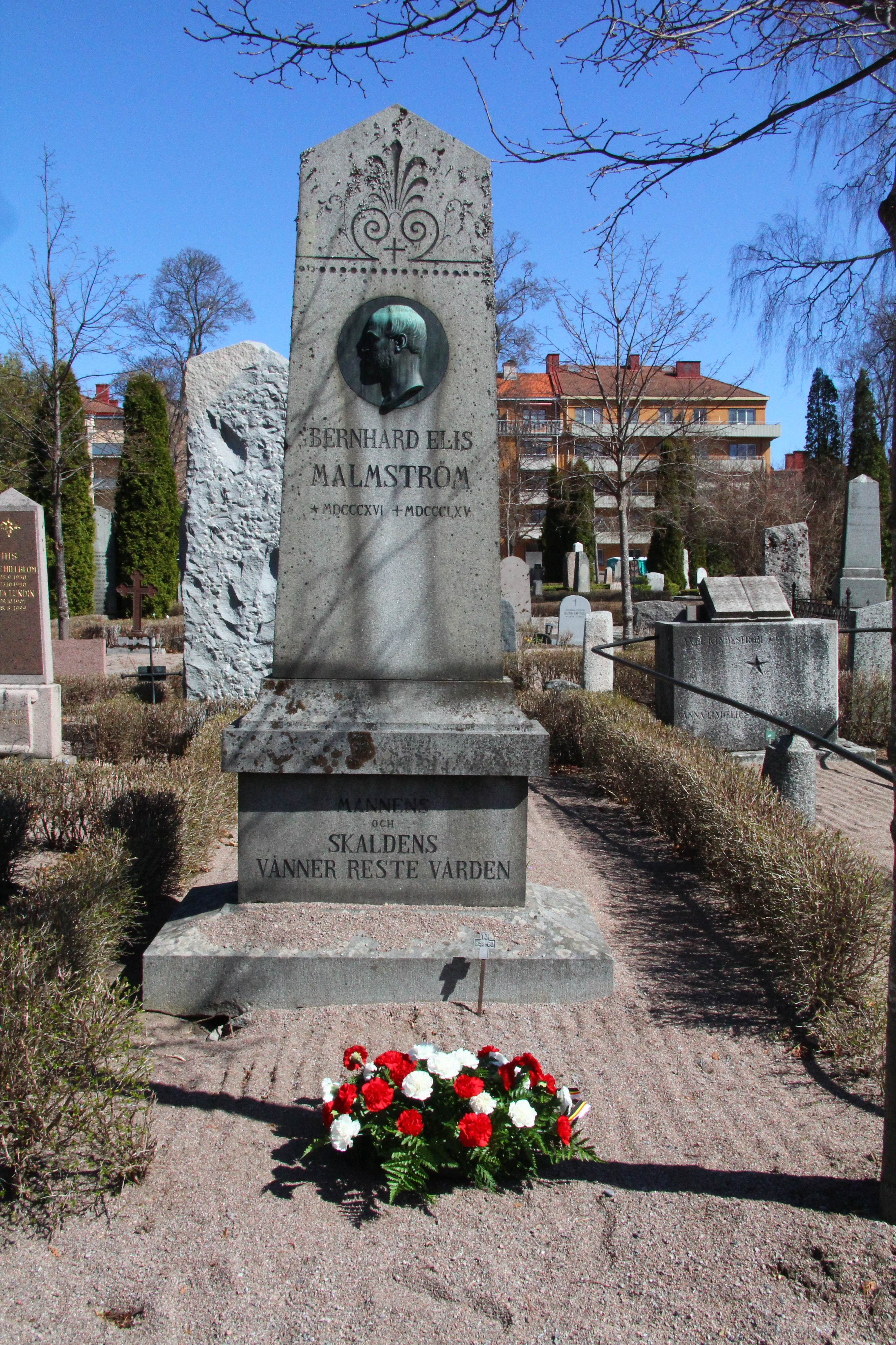 Bernhard Elis Malmströms grav fotograferad vid kransnedläggningen i samband med nationens majmiddag 2013.